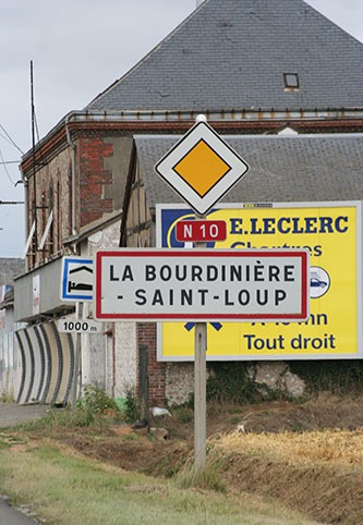 La Bourdinière-Saint-Loup, Eure-et-Loir (France), 2006.